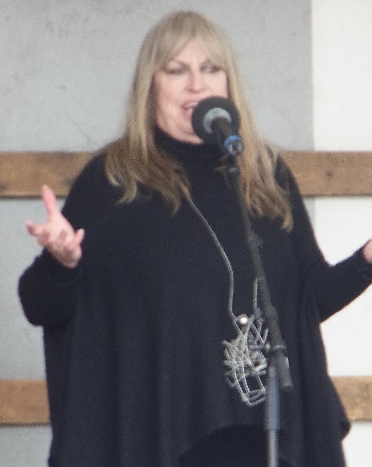 Gina Pietsch auf der Anti-Kriegsdemonstration zum Weltfriedenstag auf dem Potsdamer Platz in Berlin am 31. August 2014.